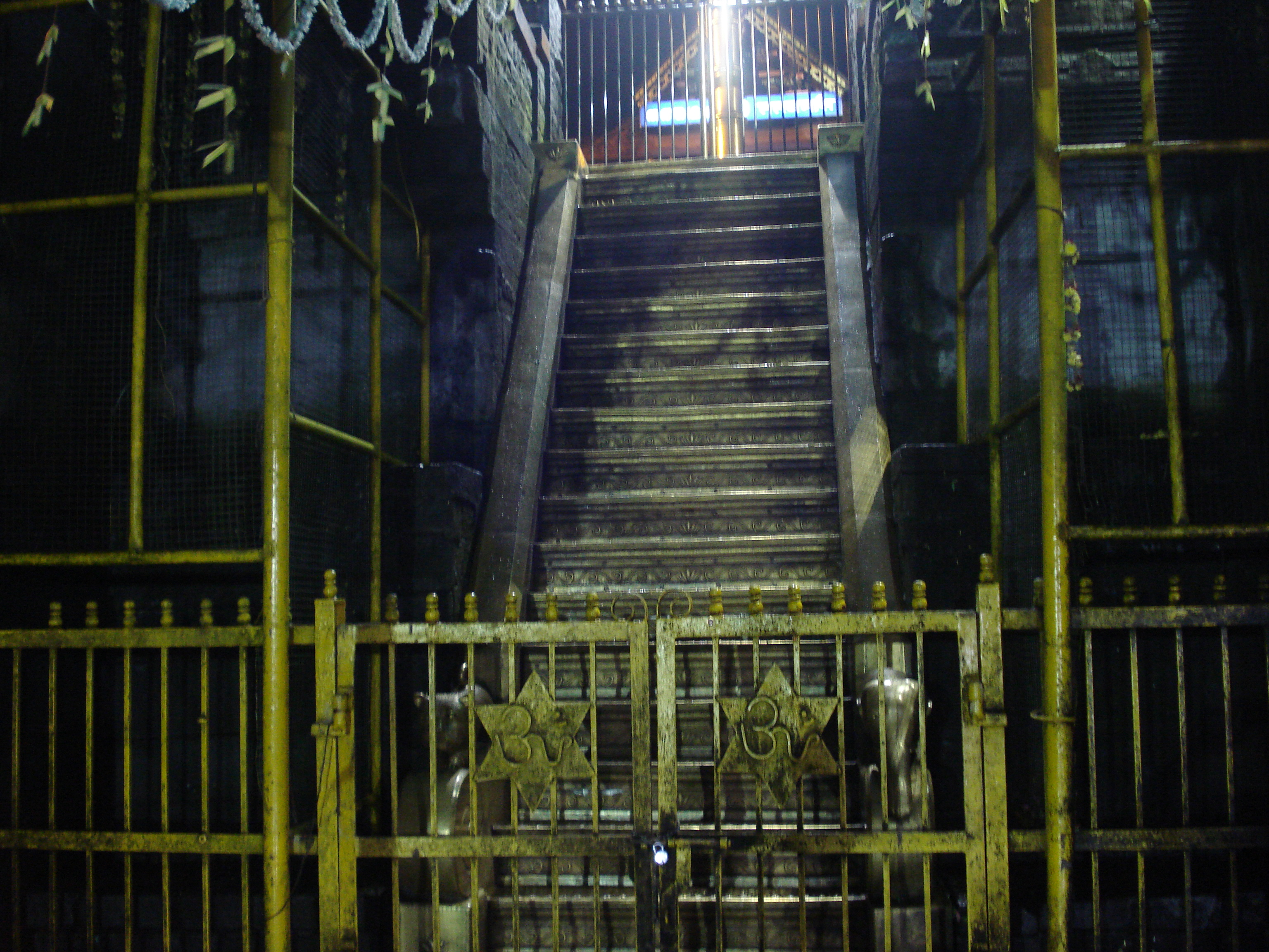 പതിനെട്ട് തൃപ്പടികൾ